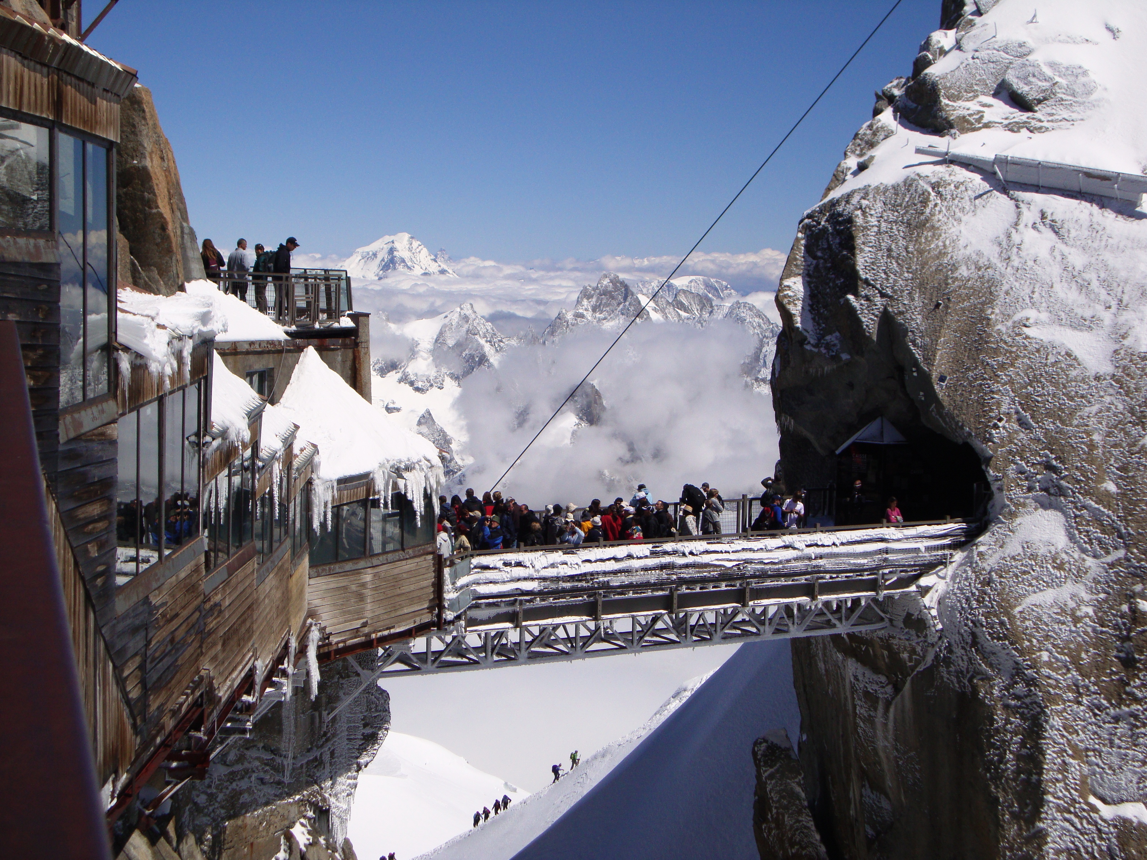 Passerelle aiguille du Midi